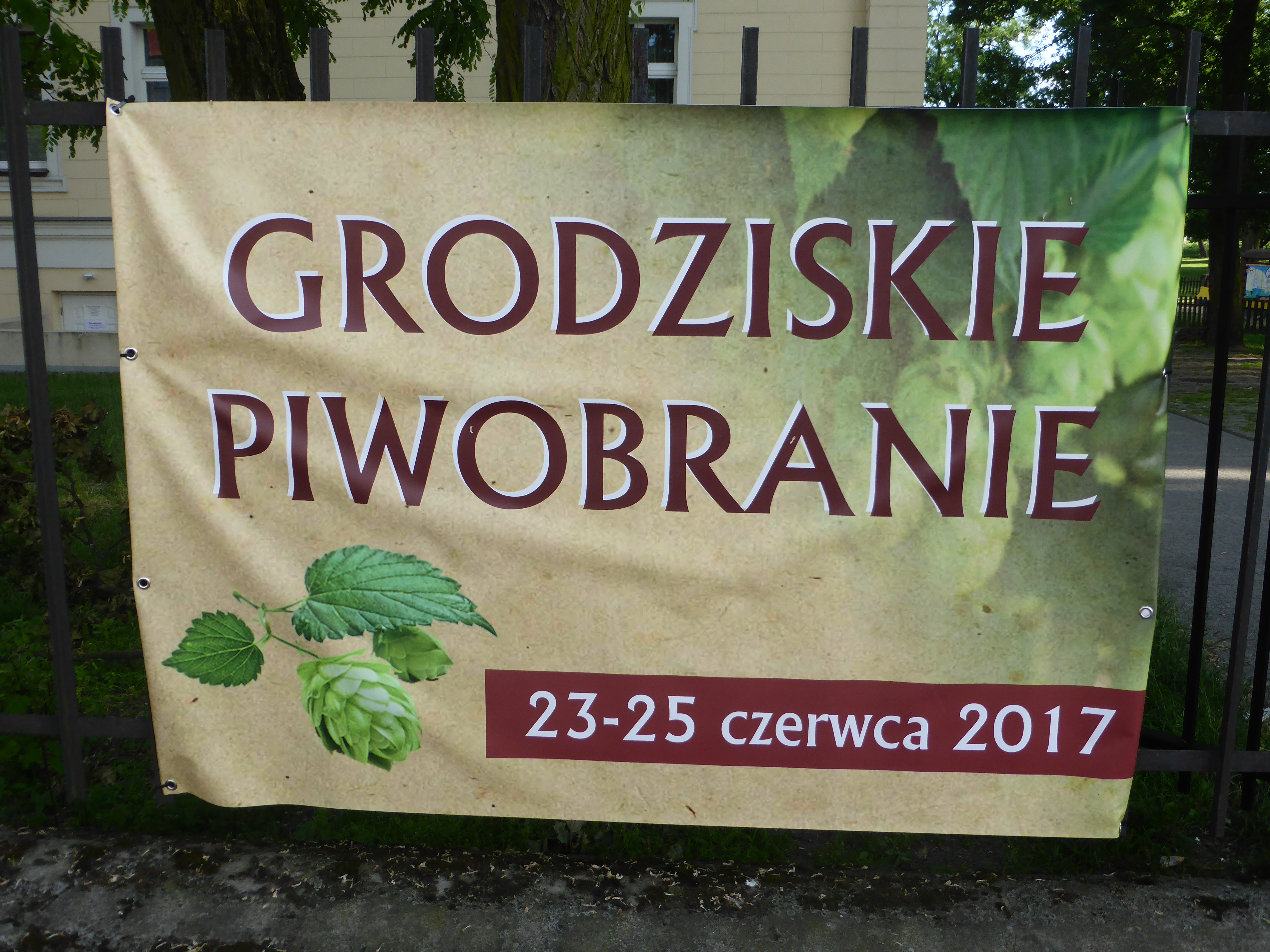 Grodziskie Piwobranie - plakat reklamowy